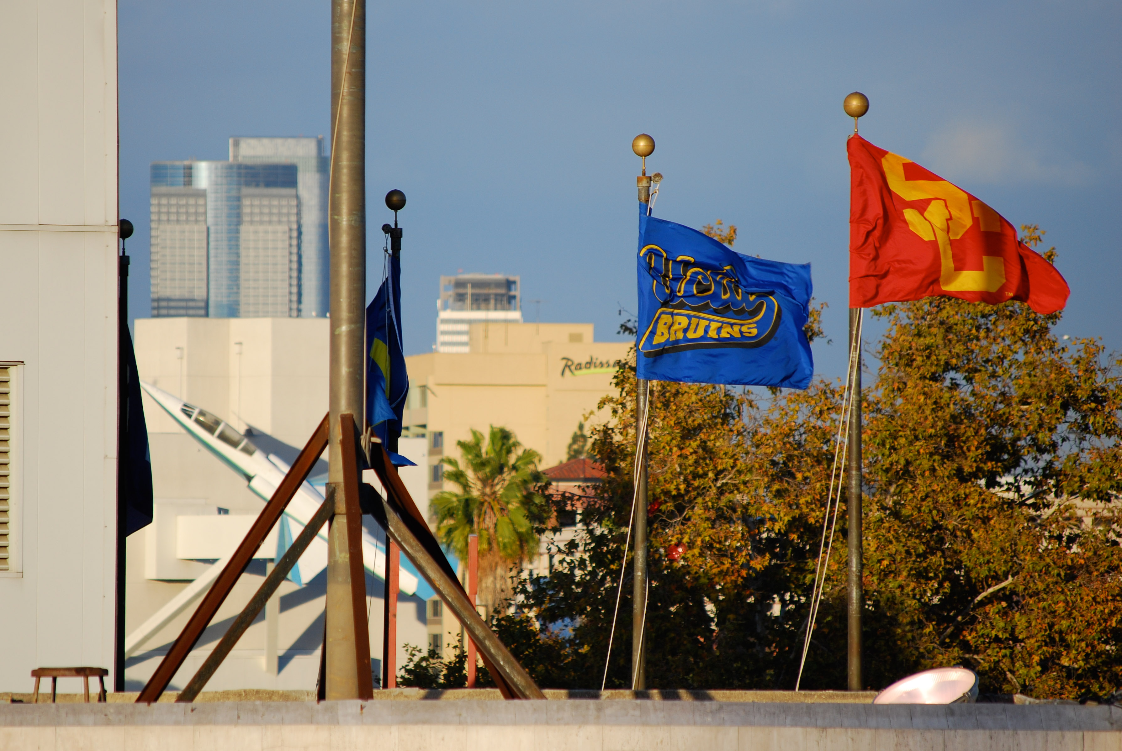 UCLA and USC flags side by side.